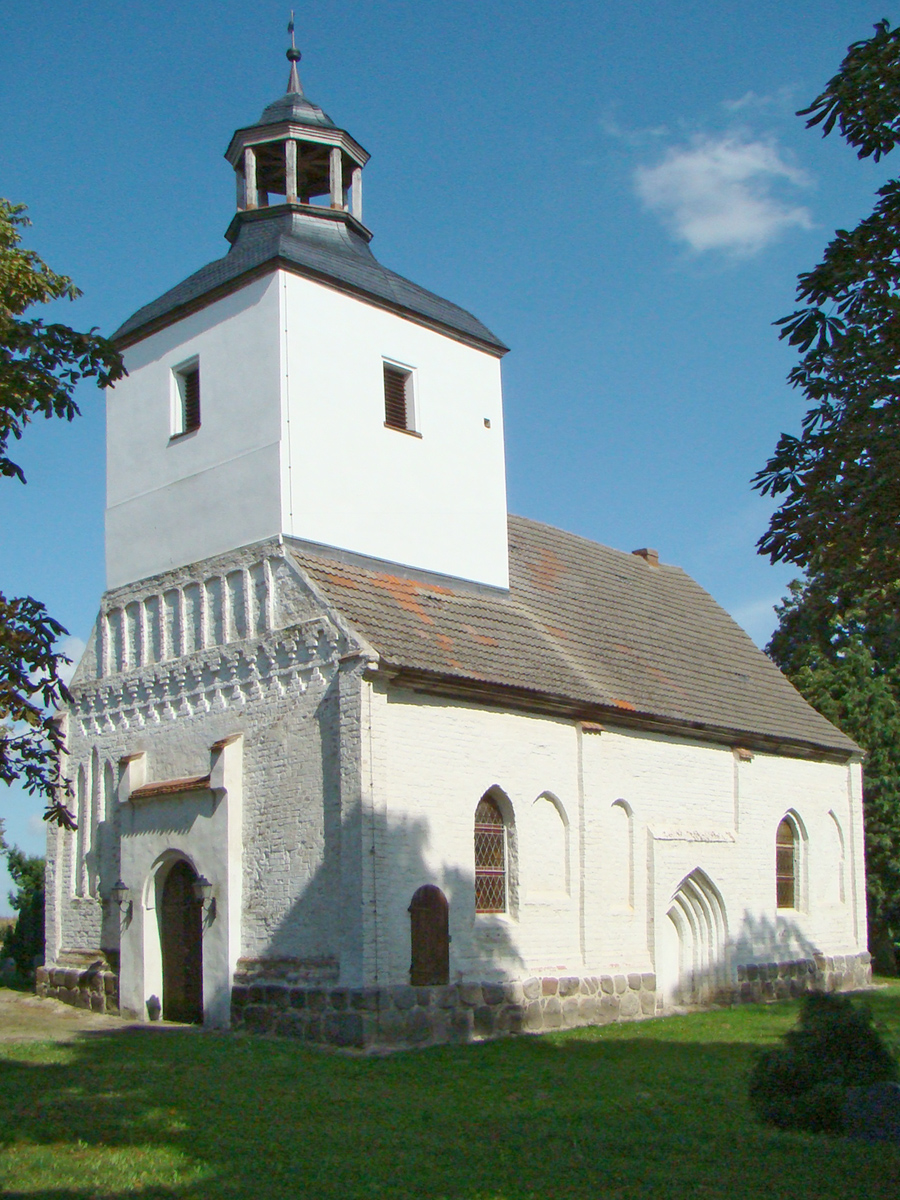 Kirche in Röckwitz, Lkr. Demmin